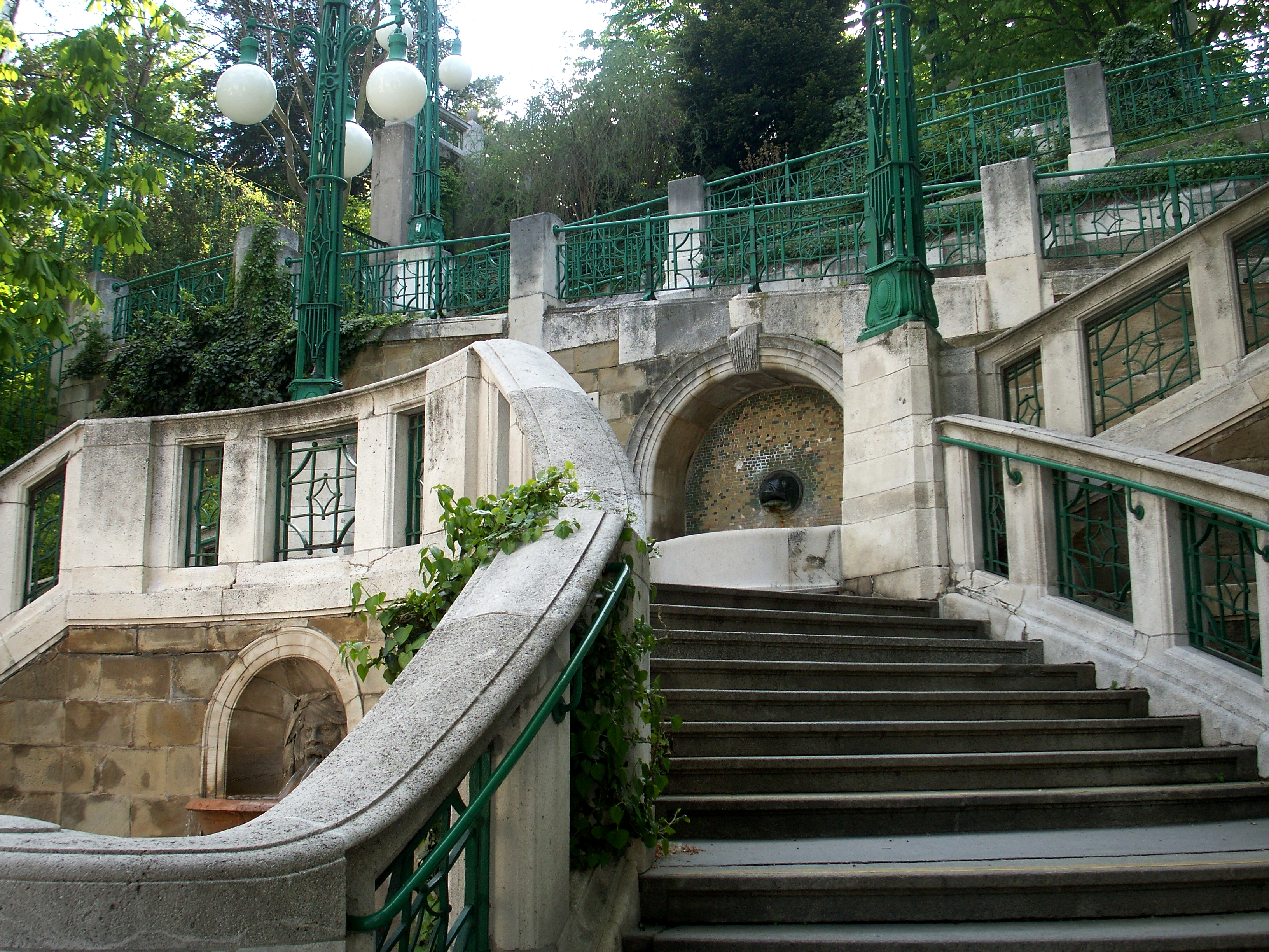 Strudlhofstiege, Wien